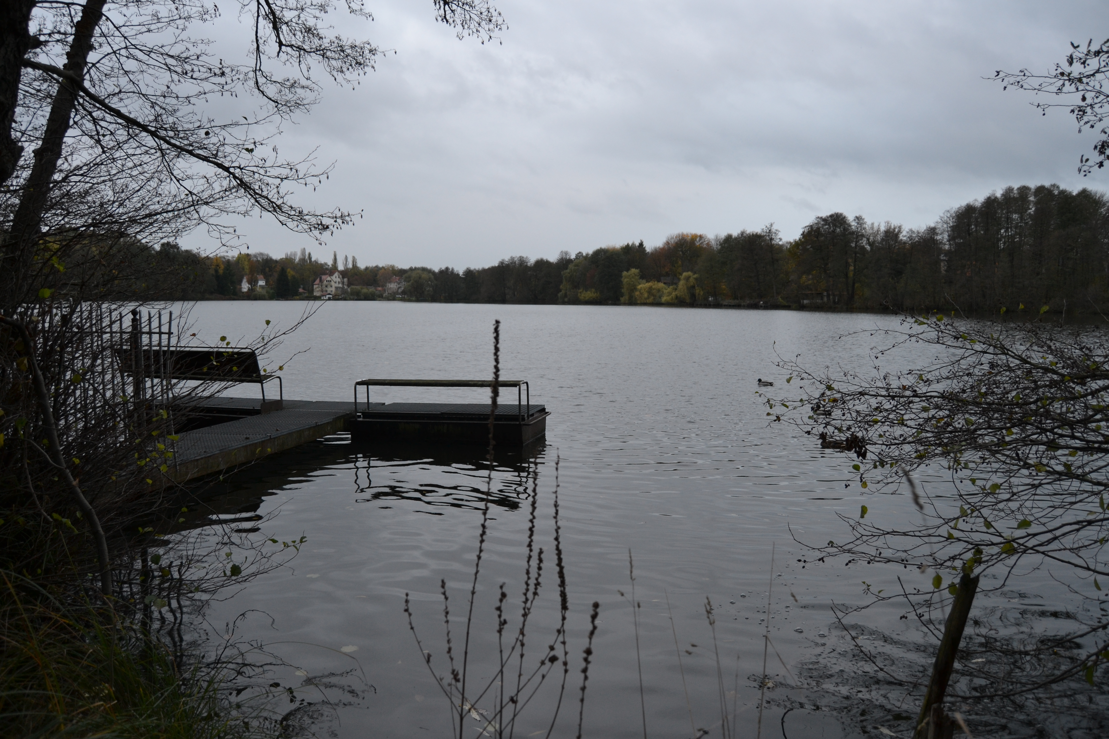 Bauernsee Woltersdorf.